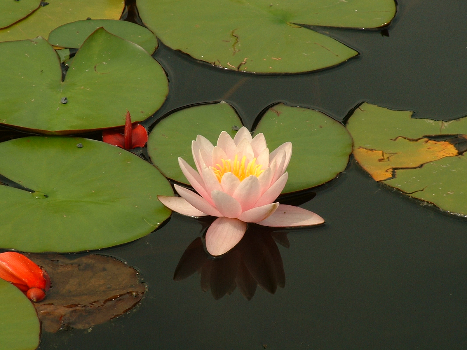 Rosa Seerose